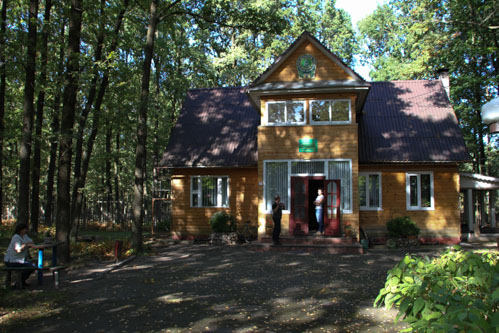 Заказнік "Непакойчыцы"